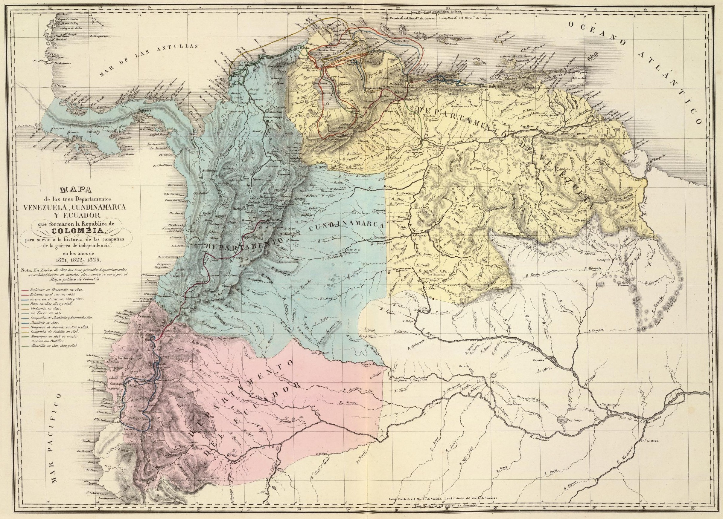 Mapa de los tres departamentos Venezuela, Cundinamarca y Quito, que confomaron la República de Colombia y que muestra las campañas de la guerra de independencia entre 1821 y 1823. Tomado del "Atlas físico y político de la República de Venezuela", 1840.